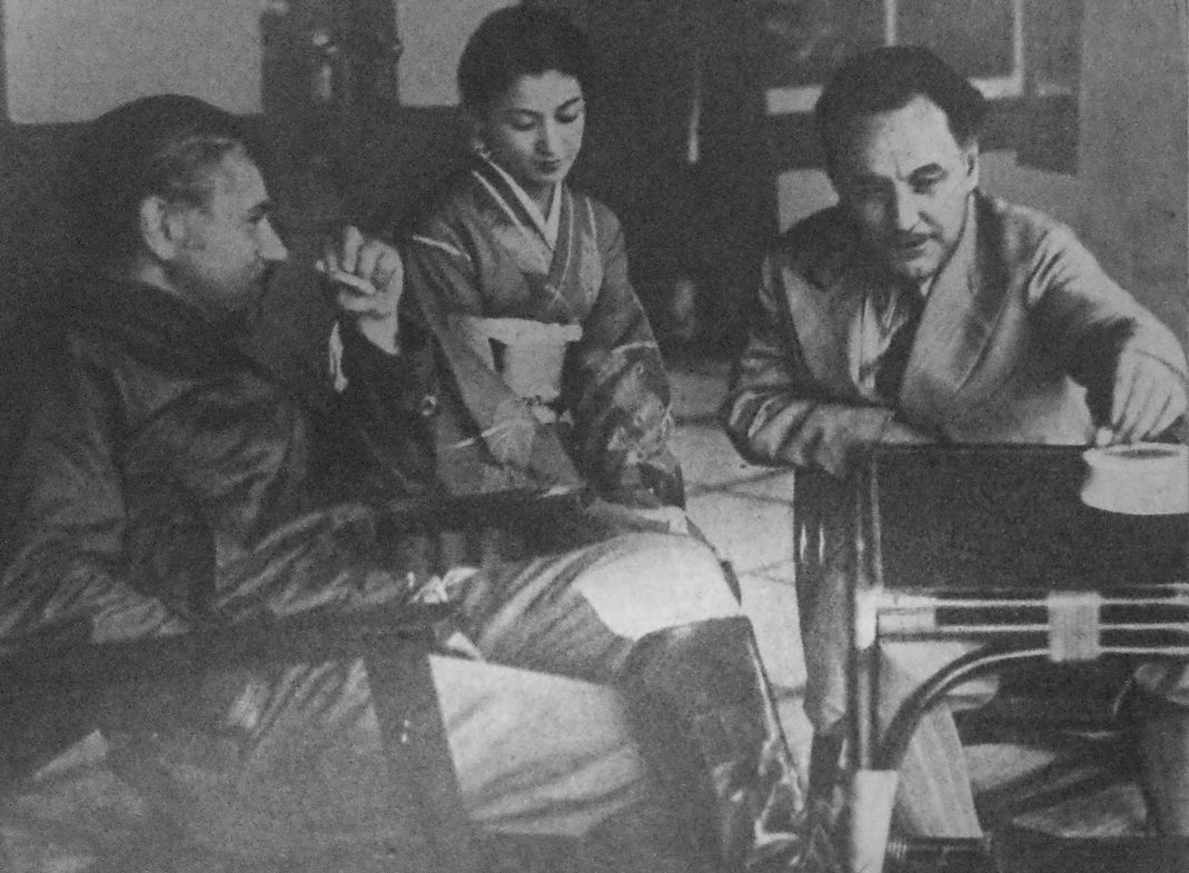 1936年の訪日時のジョセフ・フォン・スタンバーグ（左端）